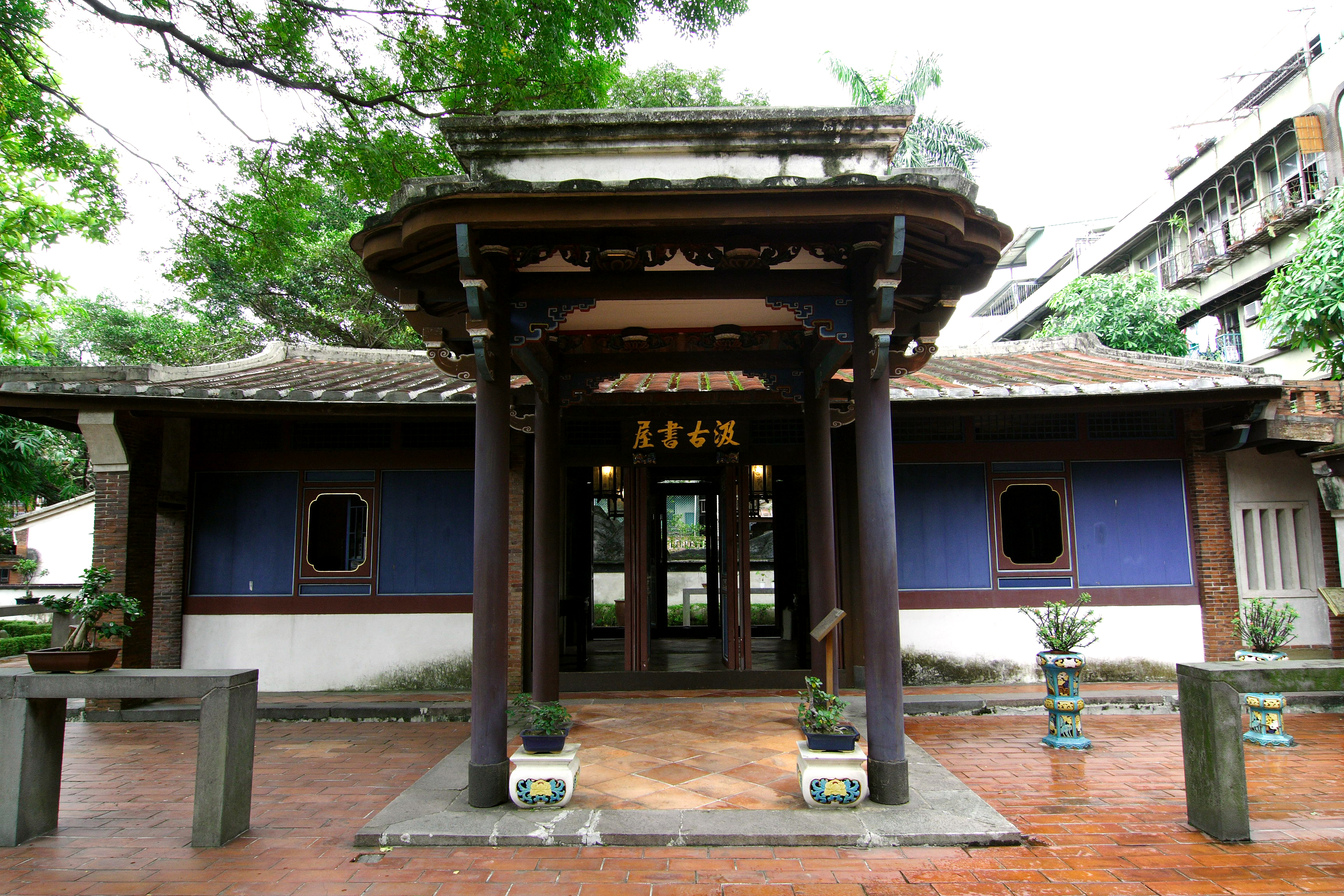 臺灣臺北縣板橋市的林本源園邸中的庭園建築汲古書屋